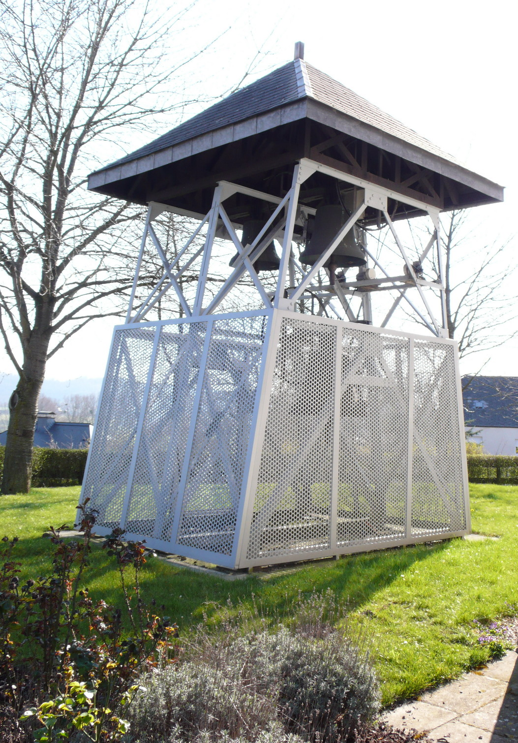 Klacke vu Biergem